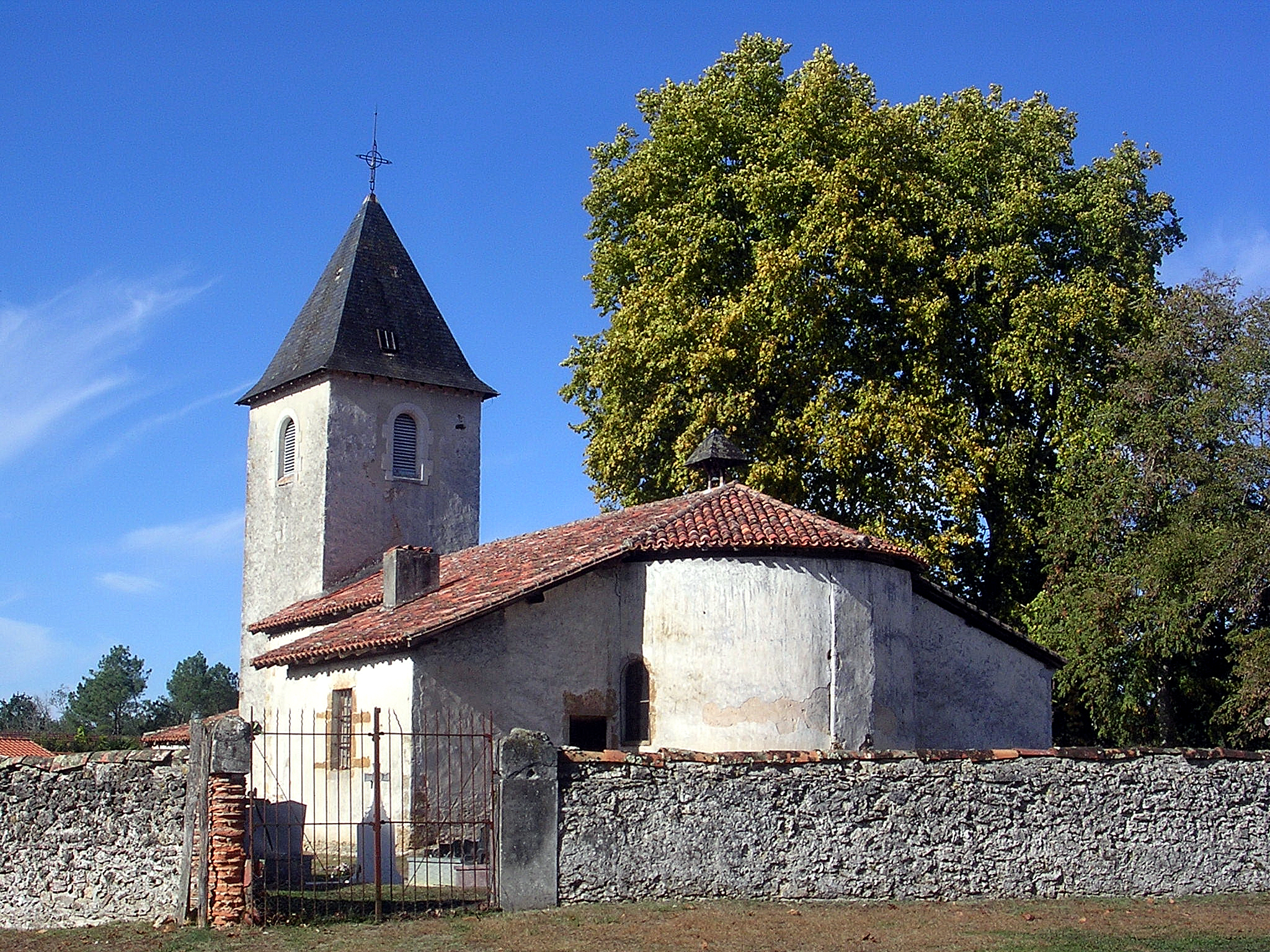 Église Saint-Saturnin de Canenx (Canenx-et-Réaut, Landes, France)